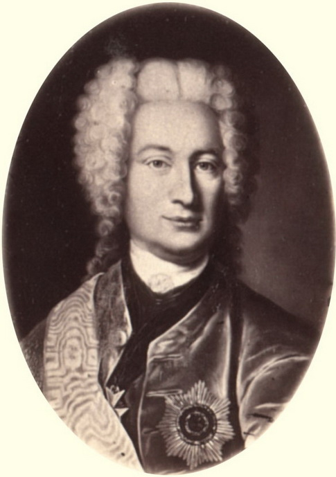 Граф Михаил Петрович Бестужев-Рюмин (1688-1760)